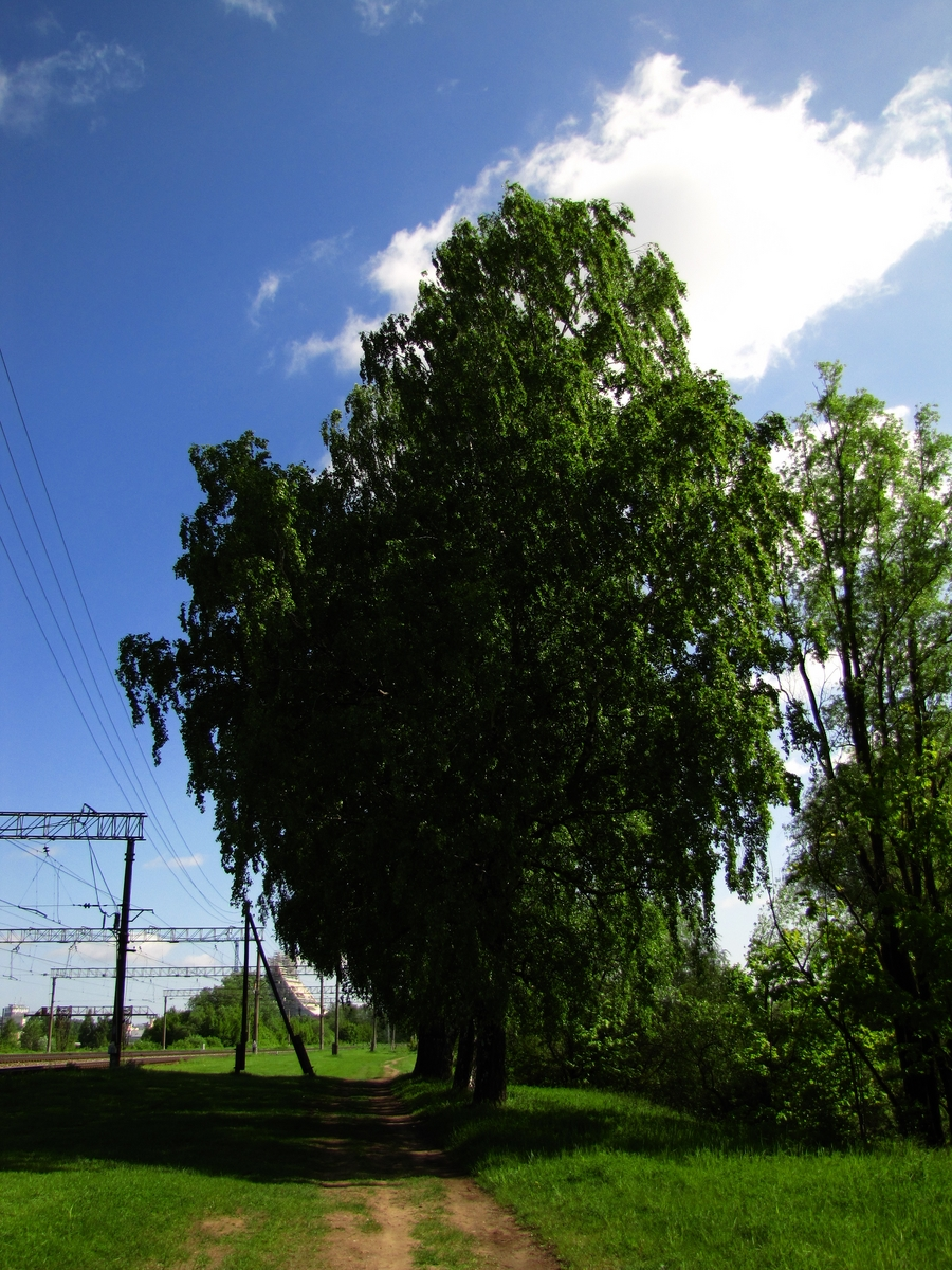 Tornakalns